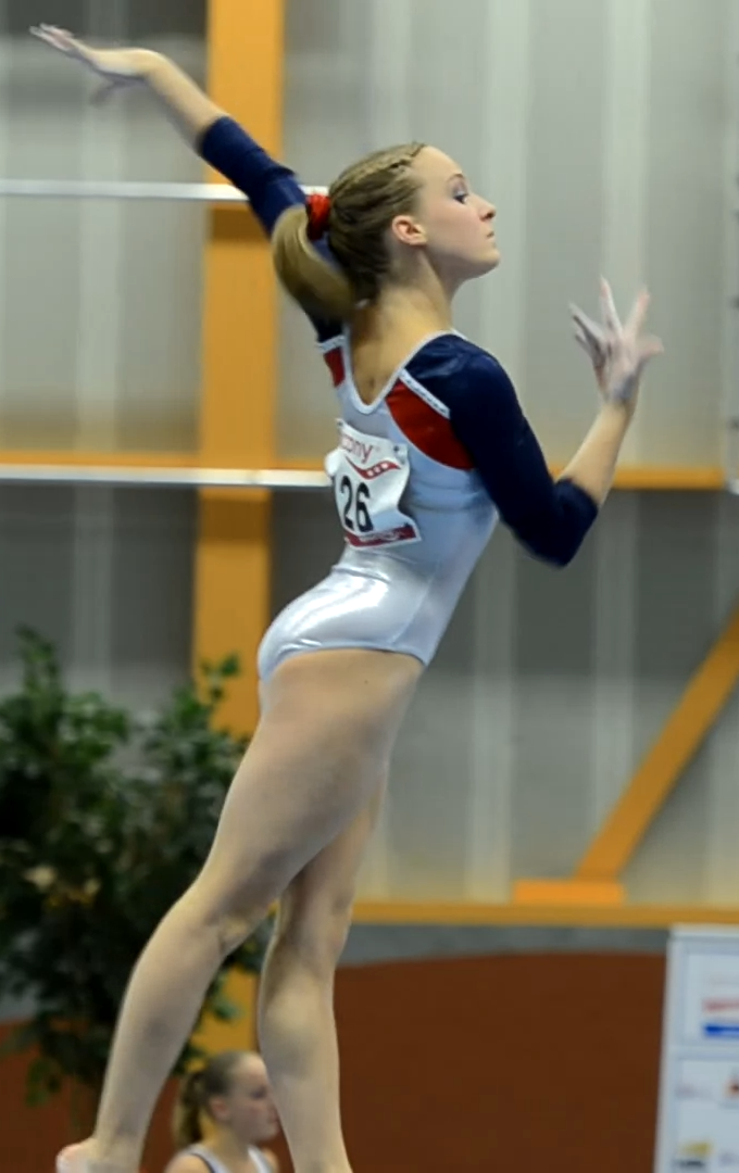 Celine van Gerner op balk Turncentrum Sportstad Heerenveen, Ere Divisie Senior, 18 juni 2011